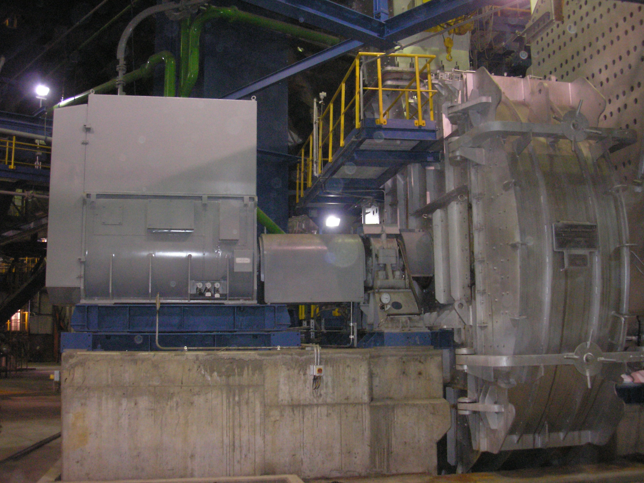 Elektrischer Antrieb der Kohlemühle in einem Kraftwerk